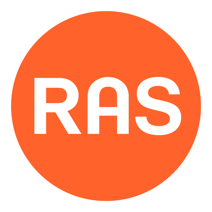 Das neue Logo der RAS 2016